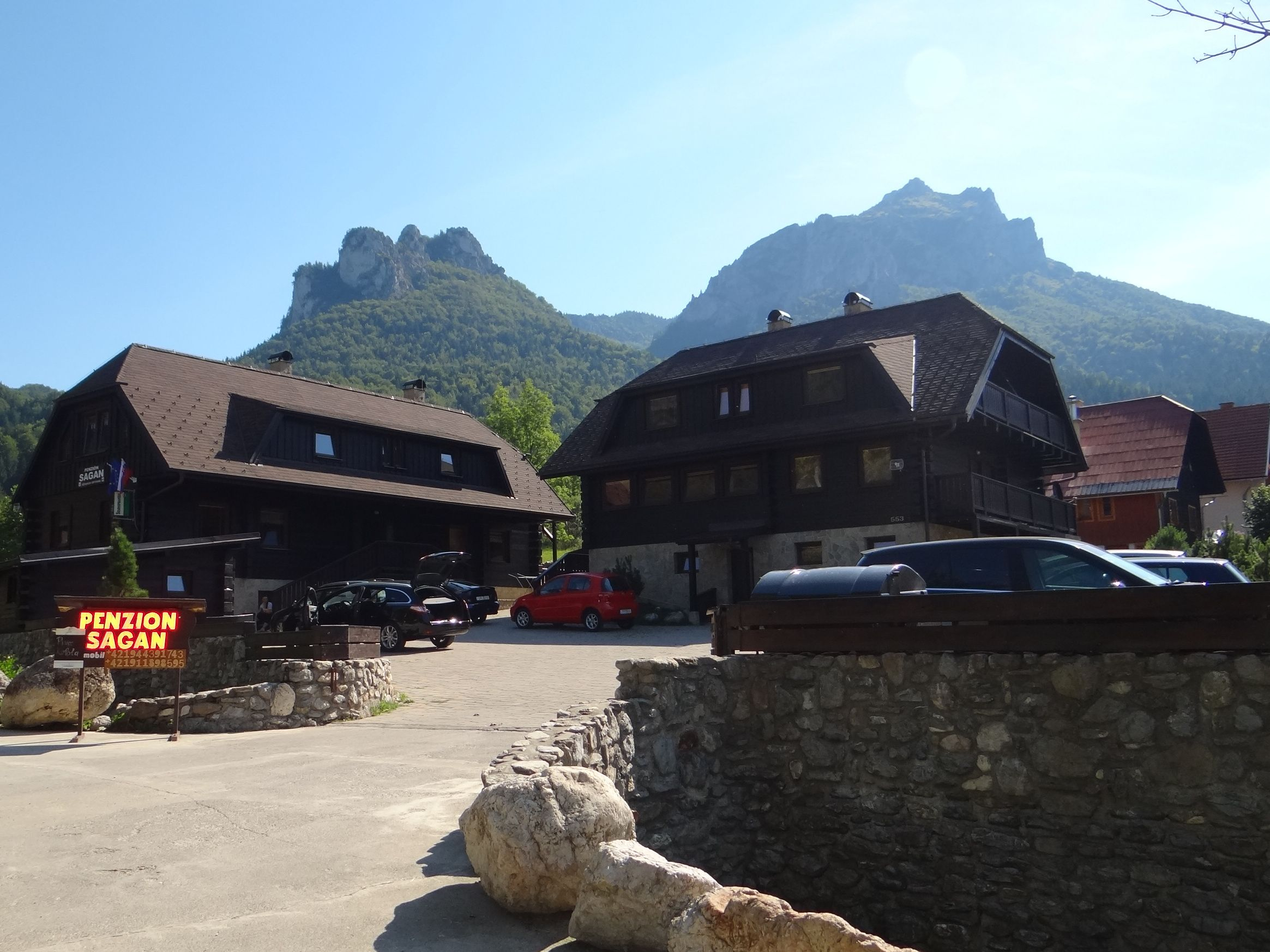 Stefanowá